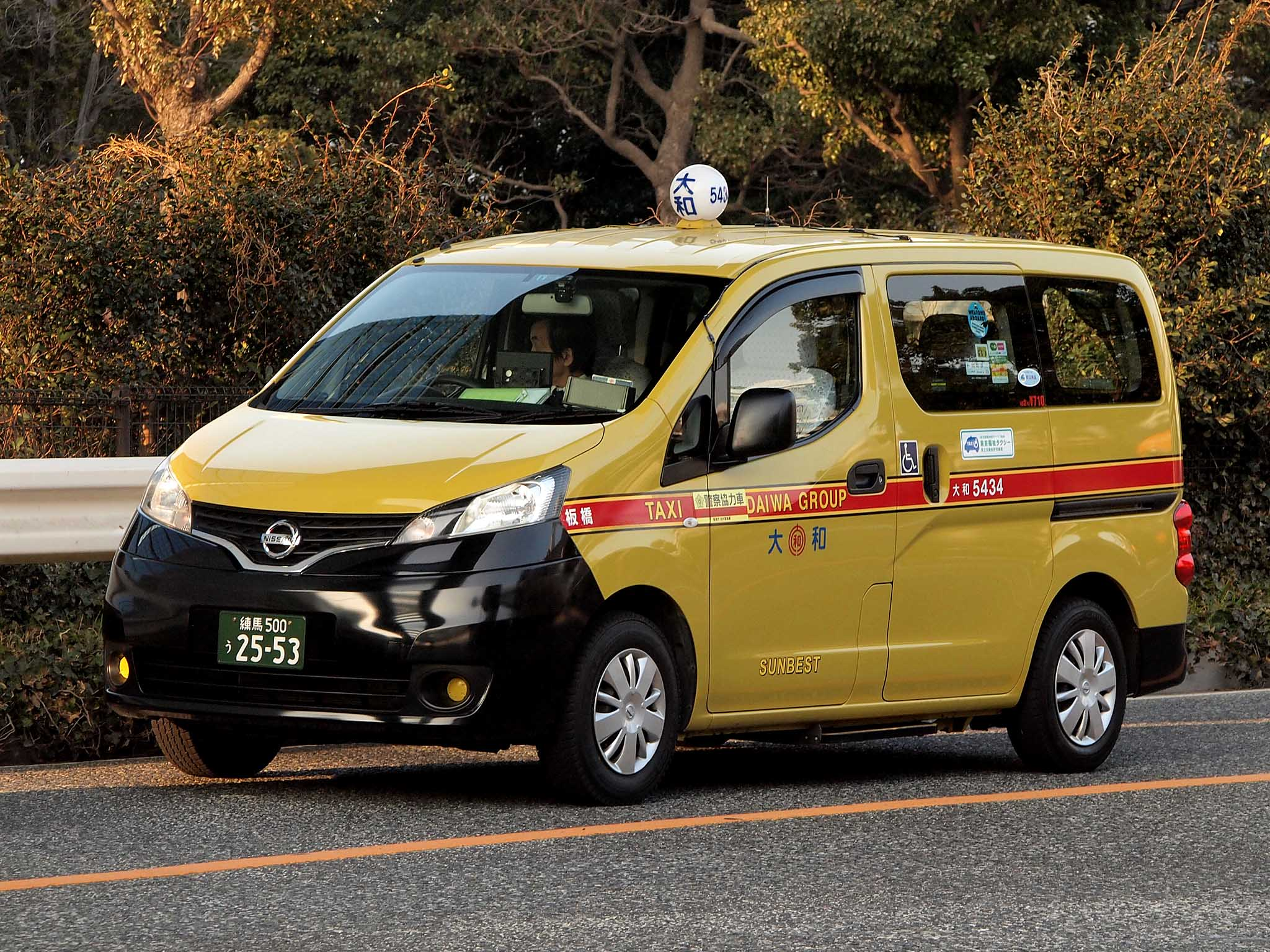 サンベスト東信の日産NV200バネットタクシー。中央無線に加盟しているが大和自動車交通と提携後の導入のため東京四社カラーを採用する。 登録番号：練馬500う2553